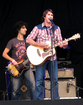 Pete Murray - Pinkpop, Landgraaf